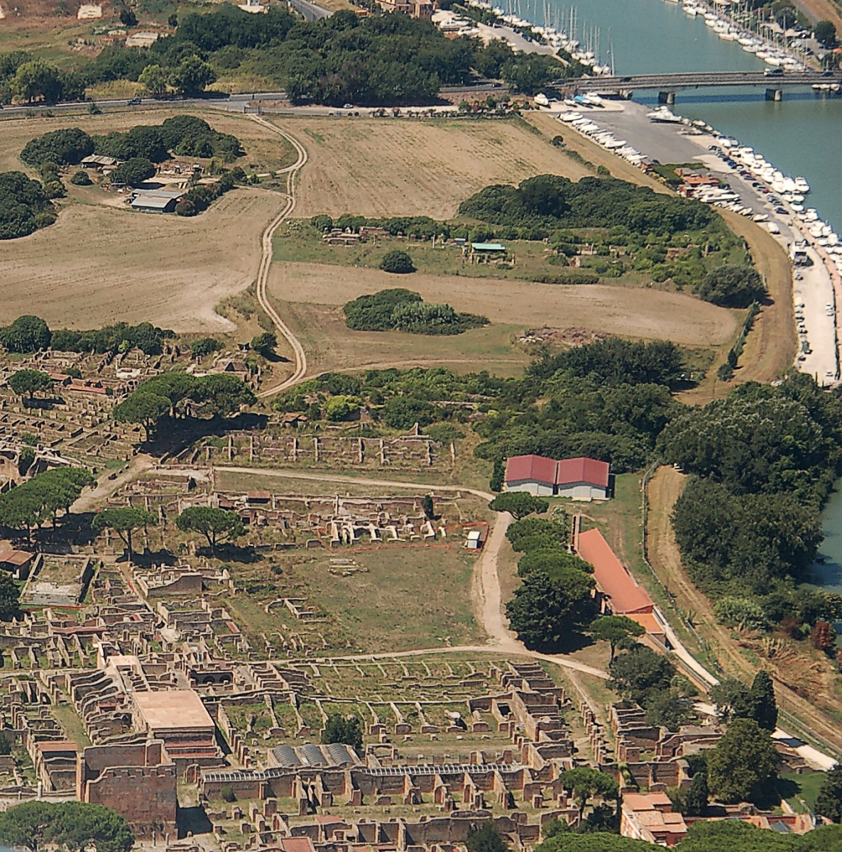 Fiumicino 2011 Durch die Übernahme der UMTS Kosten durch den gemeinnützigen Vereins Skillshare.eu konnte dieses Bild bereitstellen werden. Skillshare e.V. ist ein eingetragener gemeinnütziger Verein zur Förderung der Bildung durch Unterstützung der Erstellung, Sammlung und Verbreitung so genannten freien Wissens. IBAN: DE16 8306 5408 0004 8850 66 BIC: GENODEF1SLR Bank: VR-Bank Altenburger Land